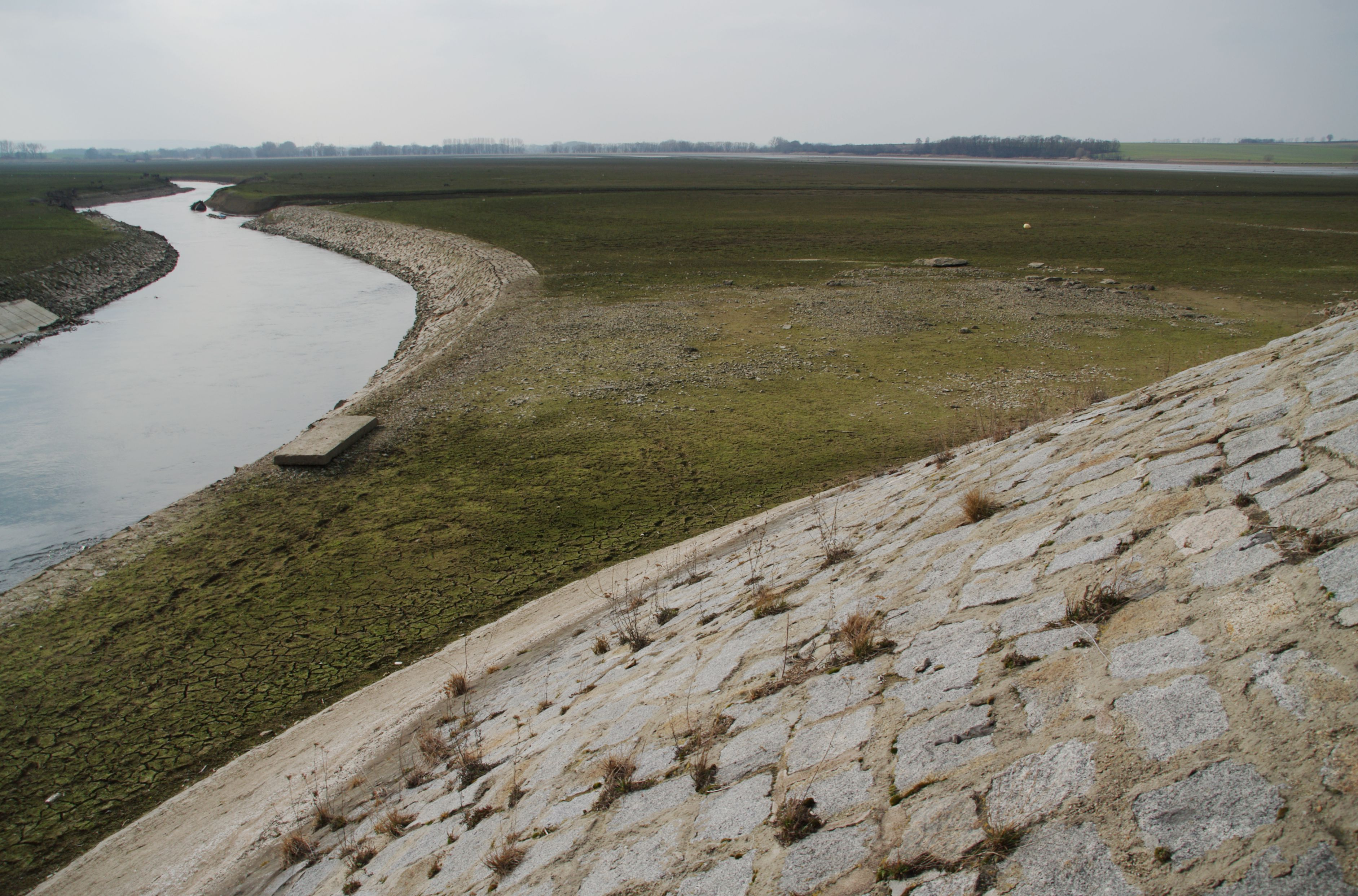 Das leere Hochwasserrückhaltebecken Straußfurt nur mit der durchfließenden Unstrut.